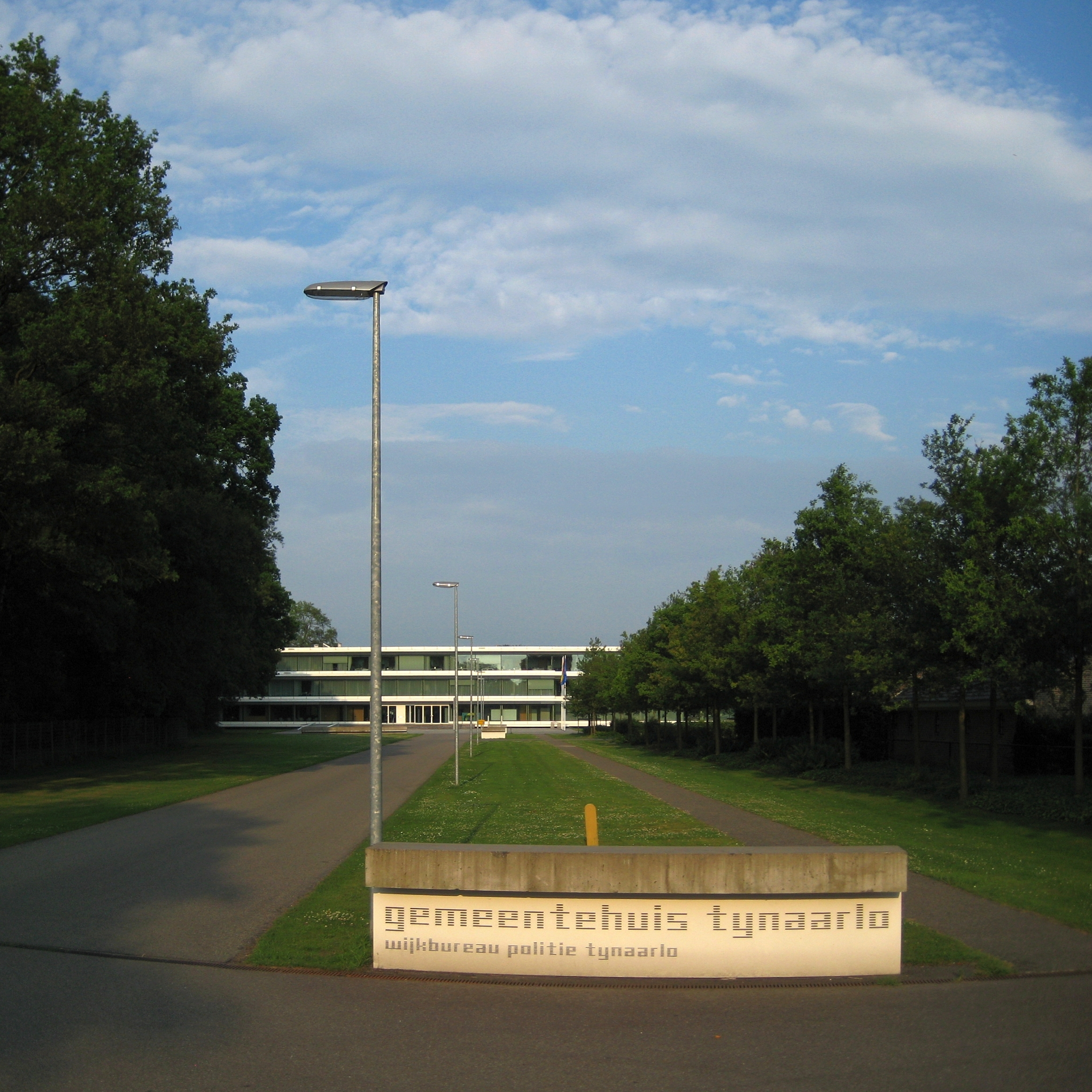 De oprijlaan naar het gemeentehuis van de Drentse gemeente Tynaarlo te Vries. Het pand werd ontworpen door het architectenbureau Claus en Kaan en voltooid in 2004.